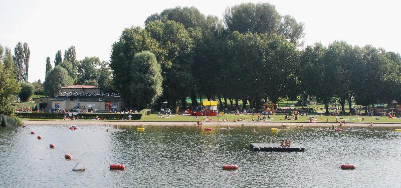 Das Strandbad Angelibad oder kurz nur Angelibad ist ein städtisches Sommerbad am rechten Ufer der Alten Donau im 21. Wiener Gemeindebezirk Floridsdorf unterhalb des Floridsdorfer Wasserparks.